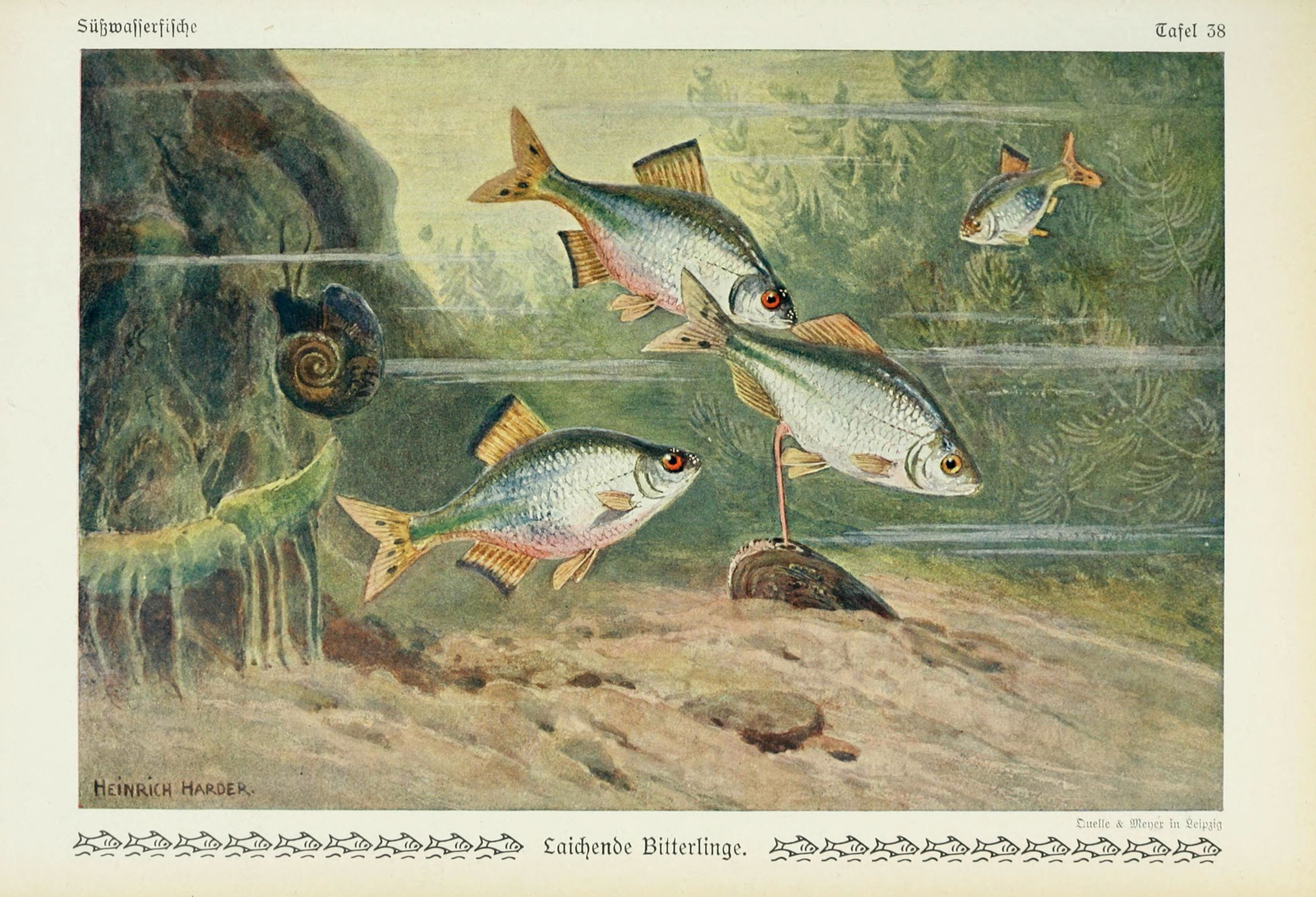 Unsere Süßwasserfische : eine Übersicht über die heimische Fischfauna nach vorwiegend biologischen und fischereiwirtschaftlichen Gesichtspunkten / von Emil Walter